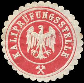 Sealing stamp Title: Kaliprüfungsstelle Description: rot, weiß, geprägt Place: size: 4 cm